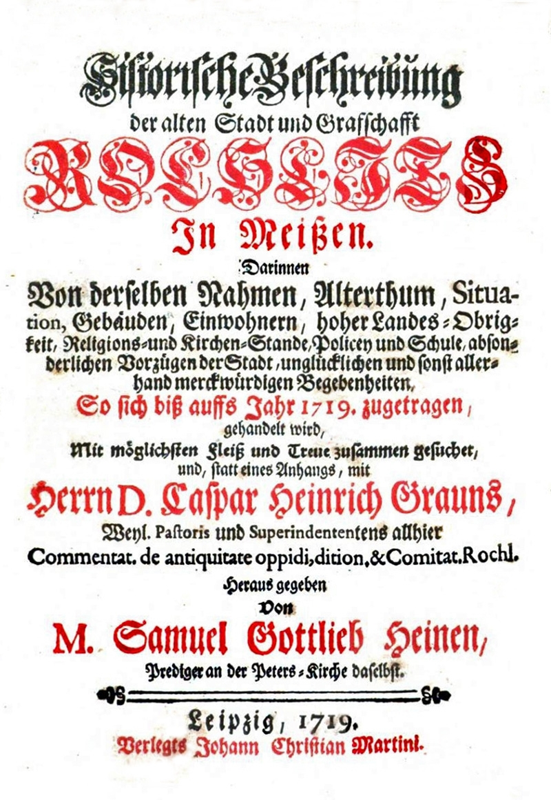 Titelblatt der Chronik von Rochlitz 1719 von Samuel Gottlieb Heine